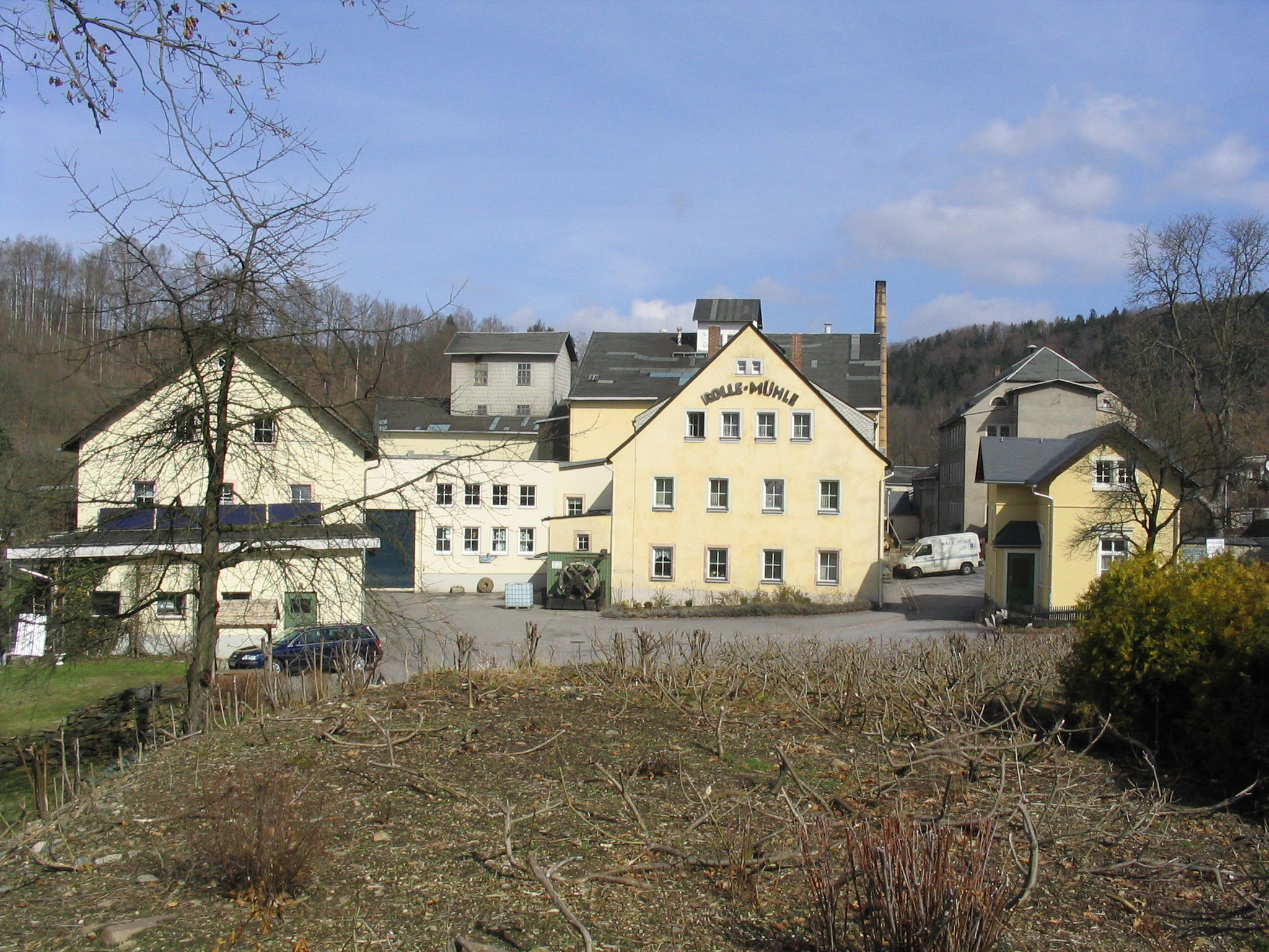 Blick von der Zschopau-Brücke zur Rolle-Mühle und zum Blaufarbenwerk Aufgenommen am 15.04.2006 von Dr. Hagen Graebner